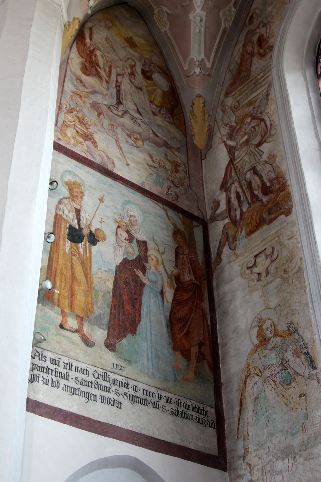 Detail der Wandmalereien der Marienkapelle der Pfarrkirche St. Laurentius Altheim, OÖ